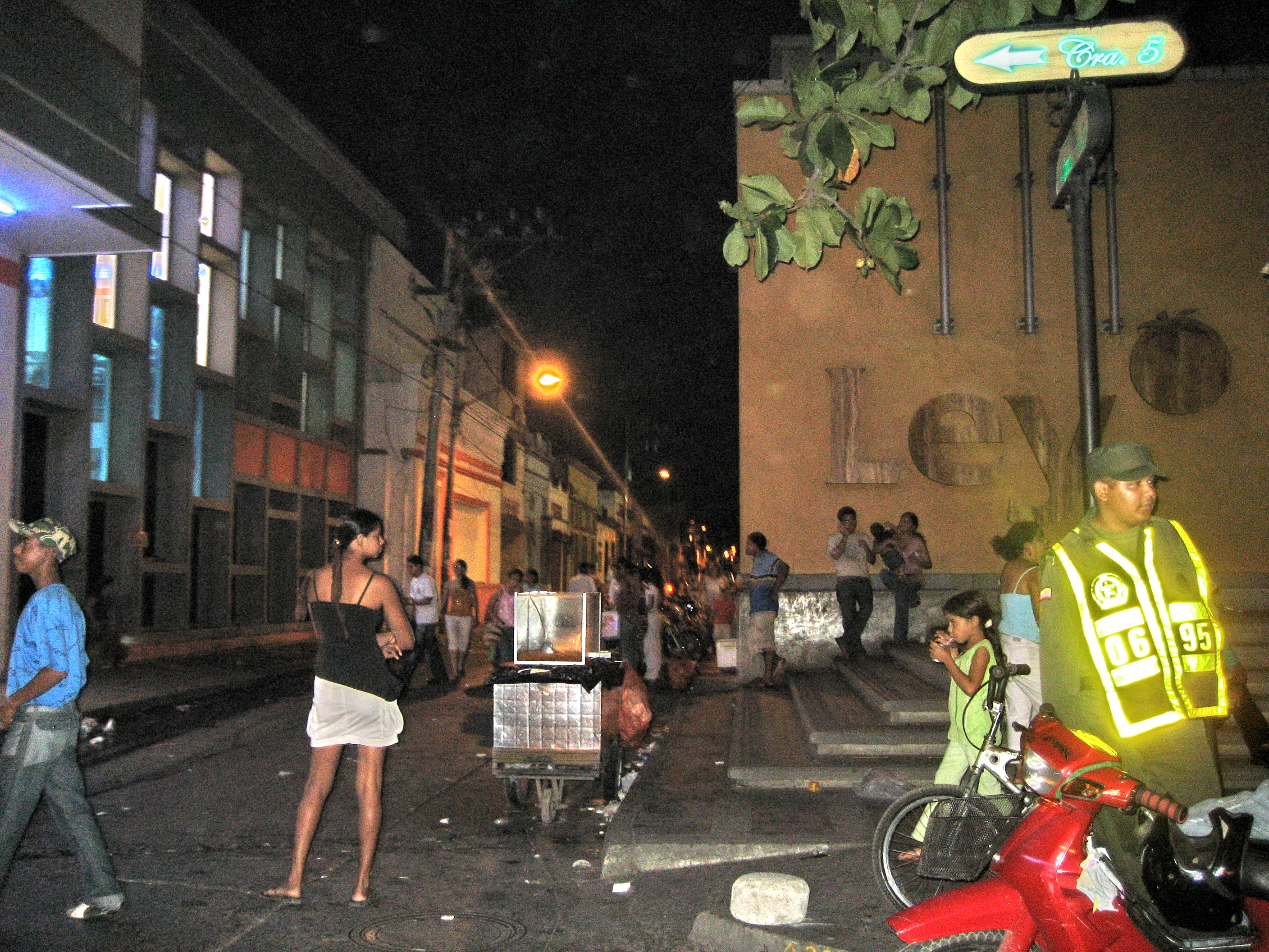 Image of Colombian national police personnel, Santa Marta.